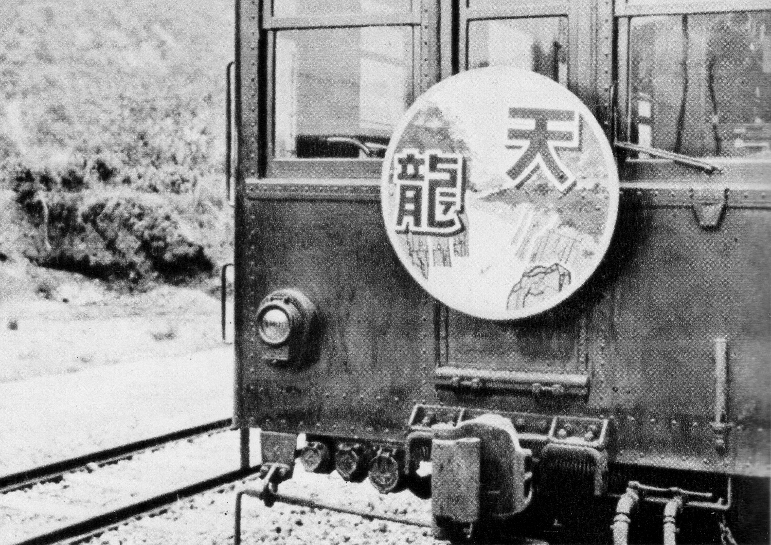 「天竜号」 車両は3200形